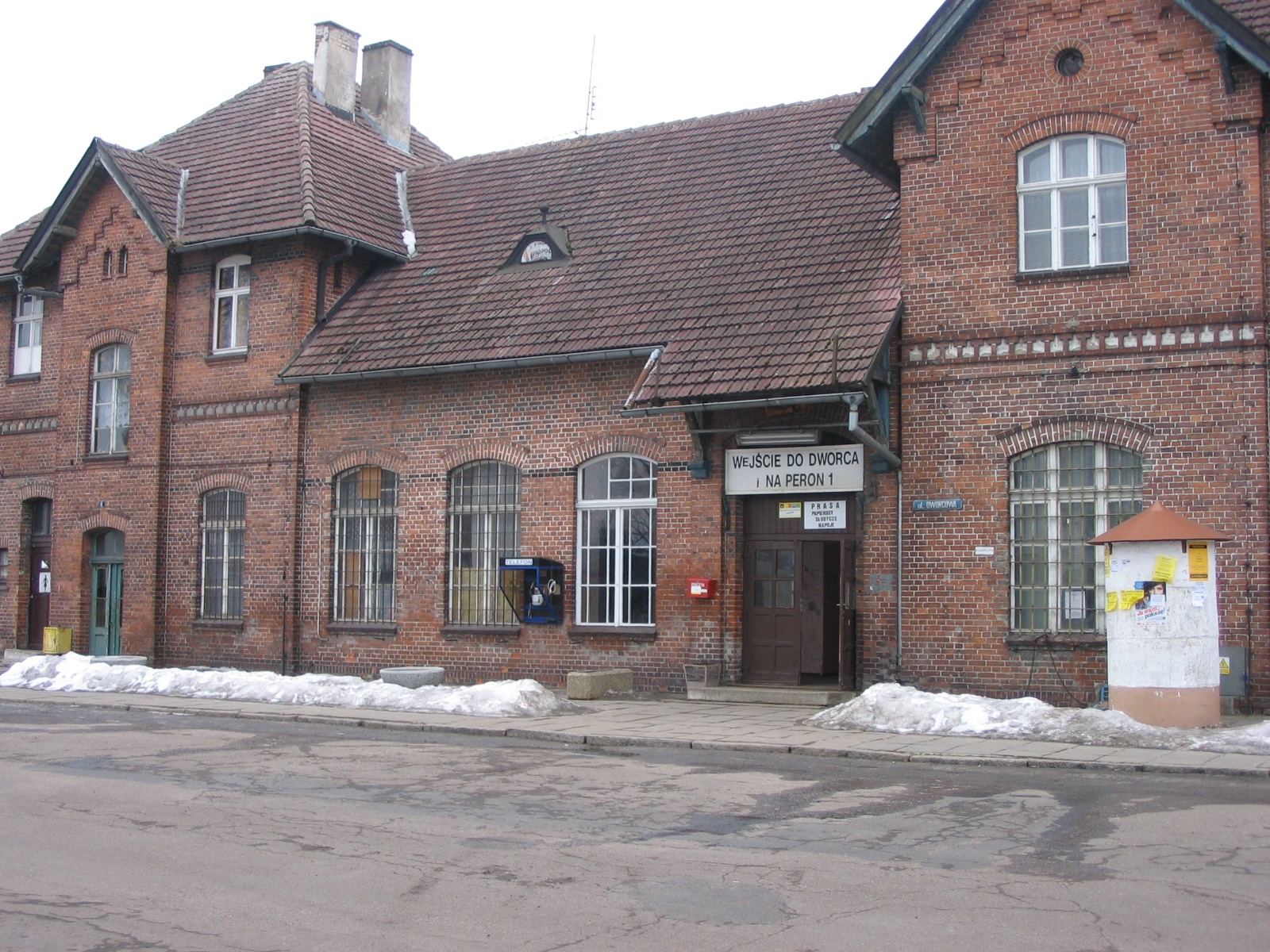 Dworzec kolejowy miasta Złocieniec